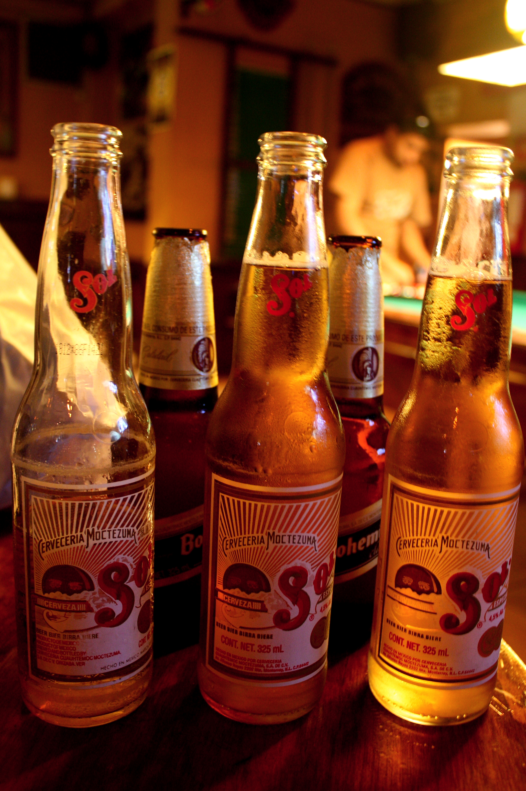 Mucho Cervezas